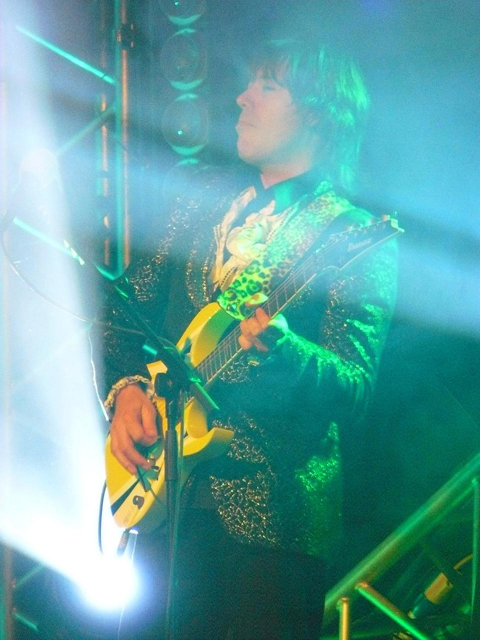 Cesareo. Lumbaart: El Cesareo.